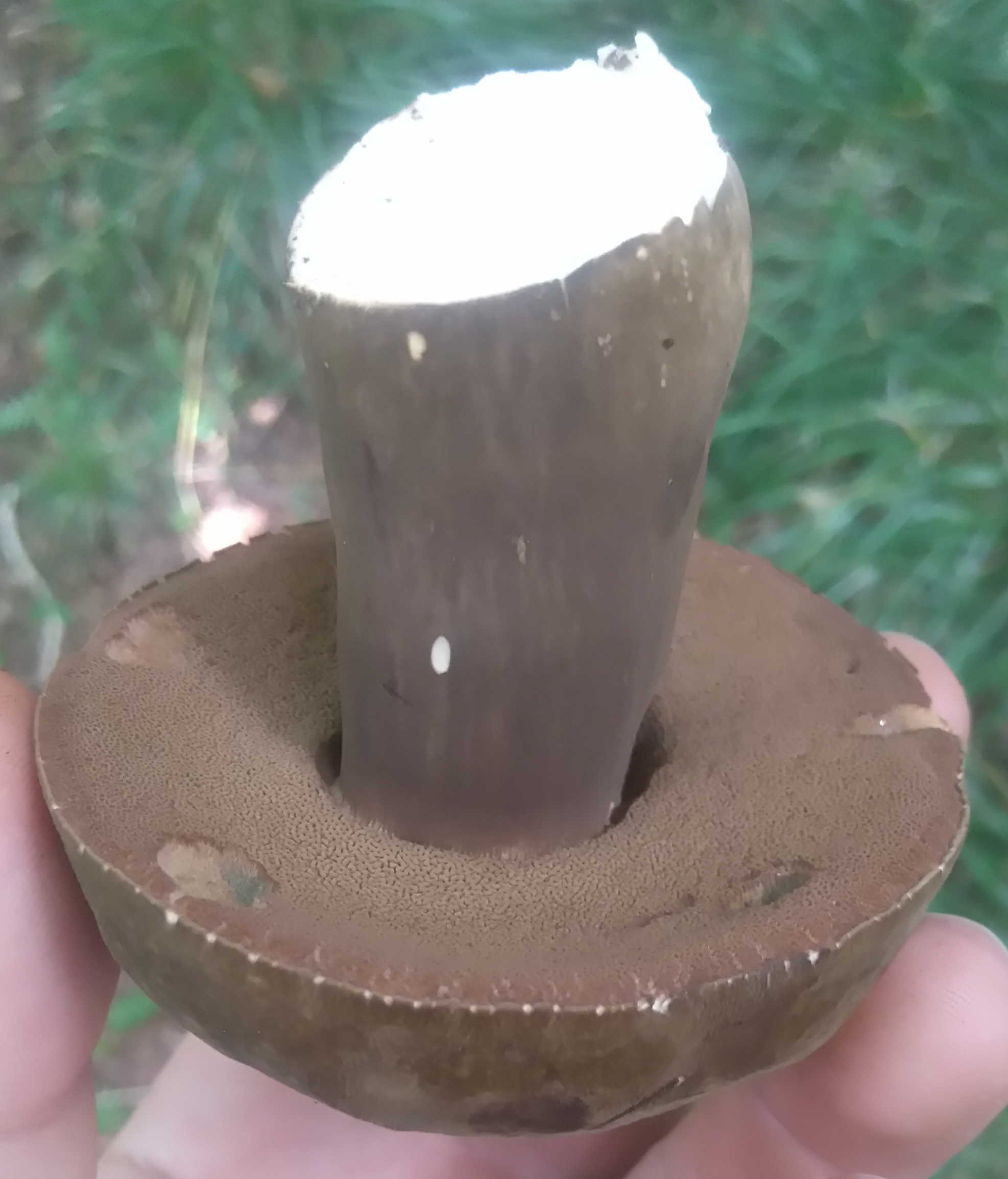 Un Bolet porphyre fraîchement ramassé vu de dessous.